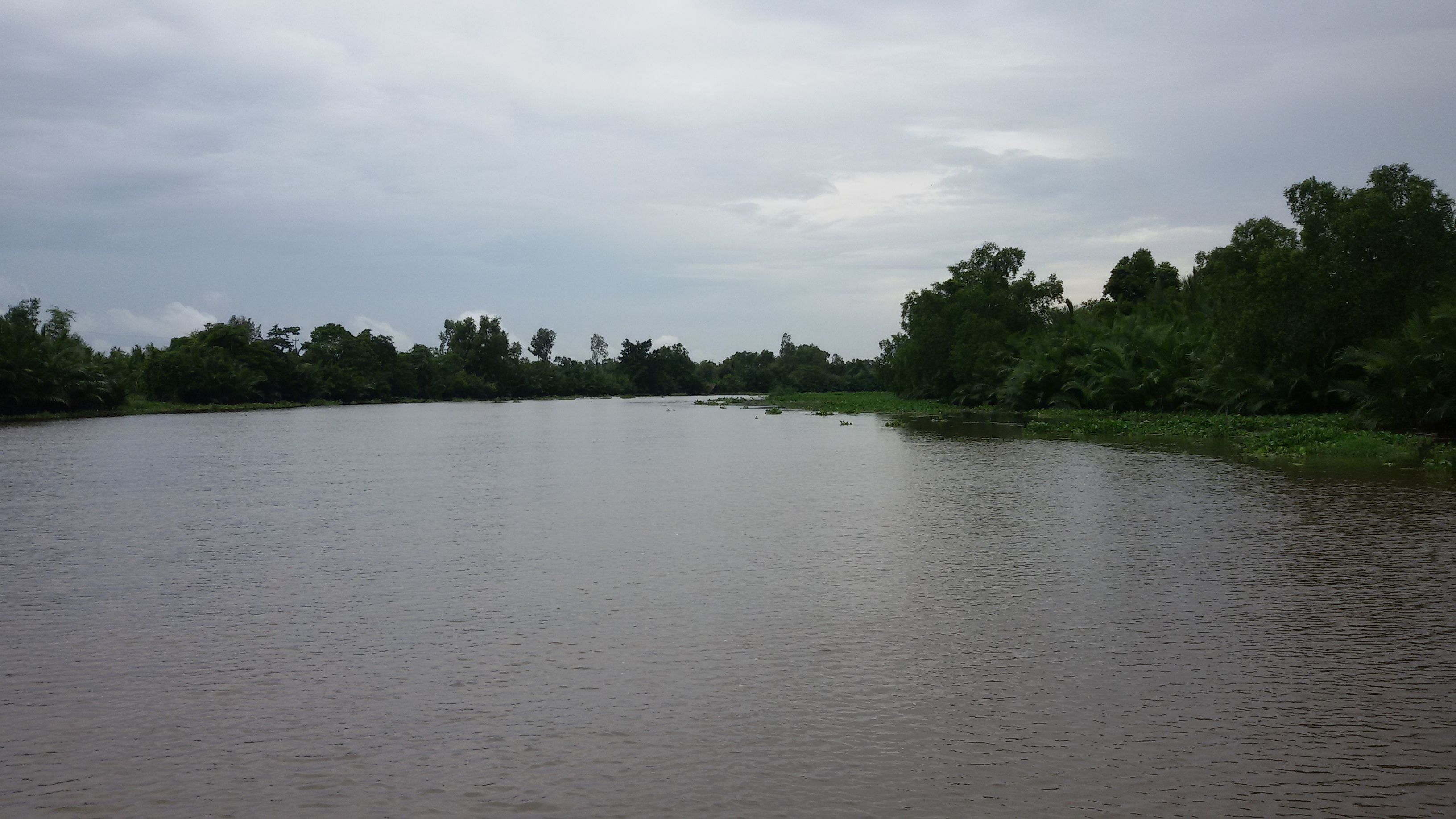 Cai River at Hồng Dân District, Bạc Liêu Province